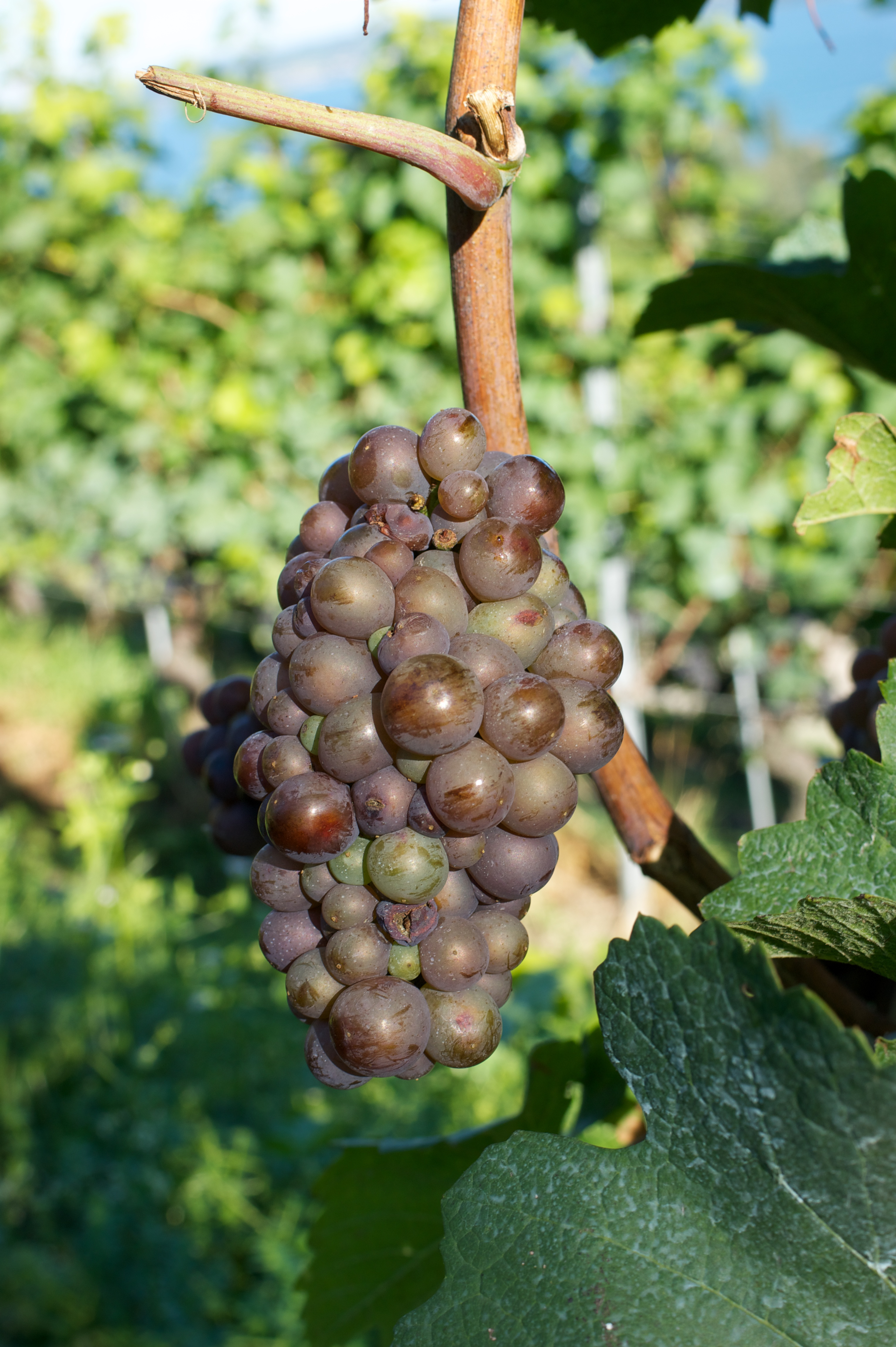 Grape de raisin du cépage Pinot Gris